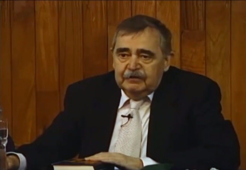 Conferencia magistral en la que el filósofo Eugenio Trías presenta su libro, El Canto de las Sirenas, el cual está integrado por 34 ensayos que abarcan un recorrido general por cuatro siglos de música.